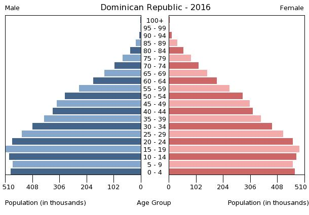 A population pyramid illustrates the age and sex structure of a country's population and may provide insights about political and social stability, as well as economic development. The population is distributed along the horizontal axis, with males shown on the left and females on the right. The male and female populations are broken down into 5-year age groups represented as horizontal bars along the vertical axis, with the youngest age groups at the bottom and the oldest at the top. The shape of the population pyramid gradually evolves over time based on fertility, mortality, and international migration trends.